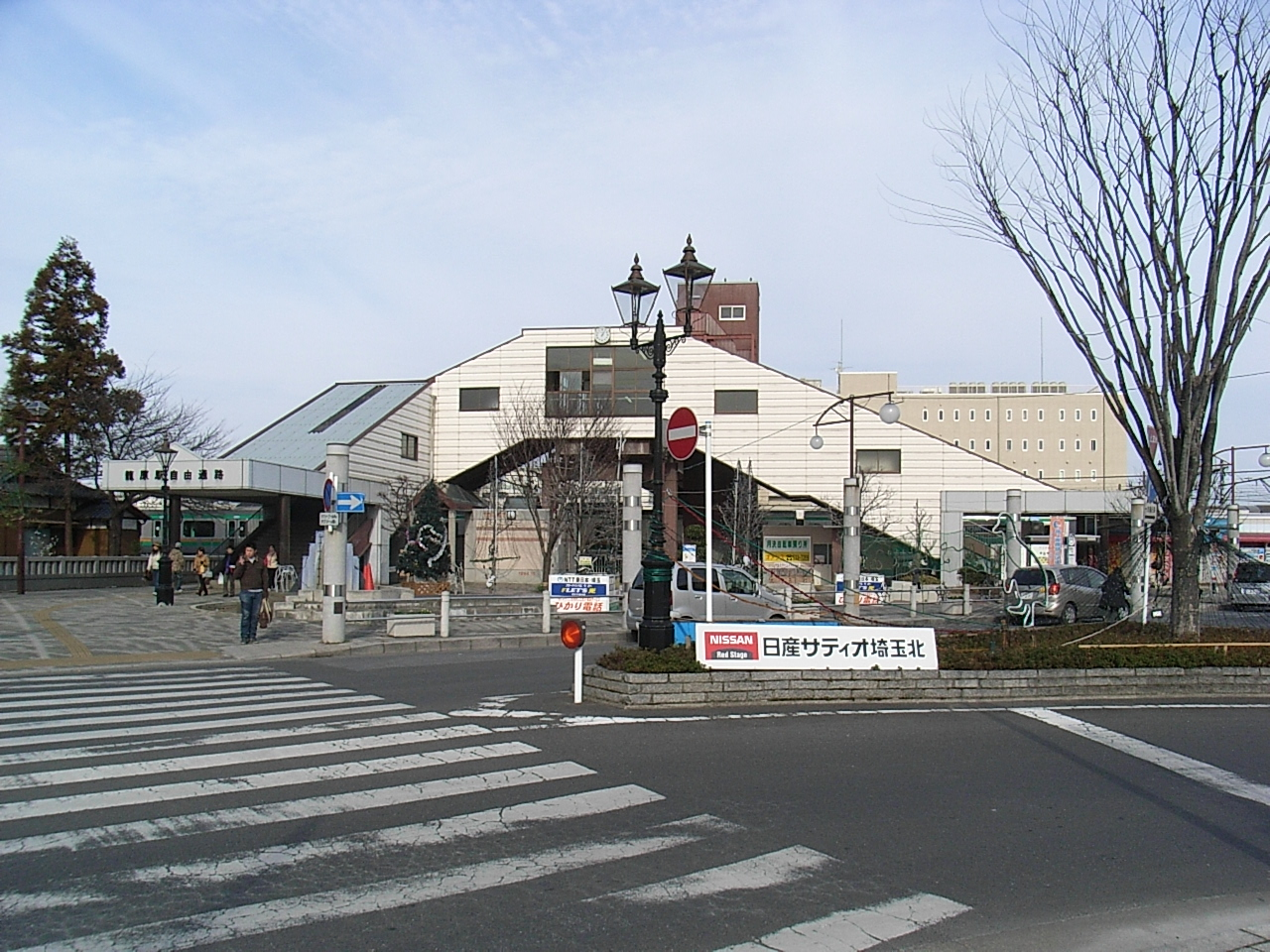 Kagohara Station (South Entrance) on JR Takasaki Line. (713,Niibori,Kumagaya-shi,Saitama-ken,JAPAN)